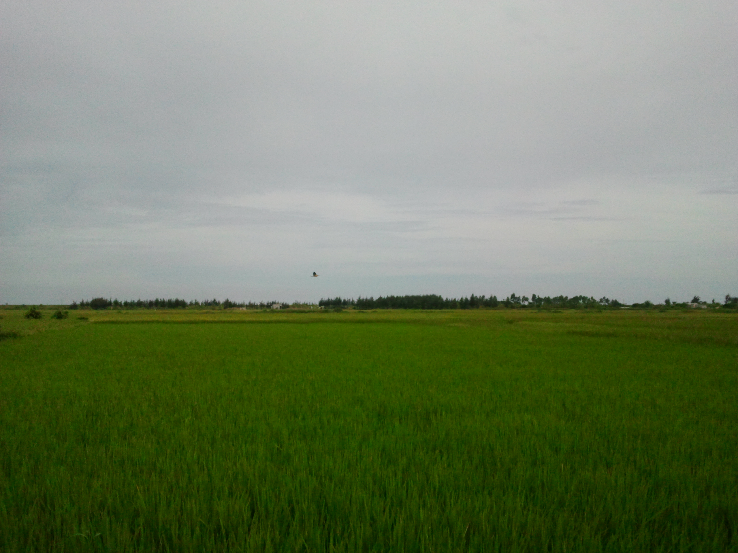 Cánh đồng lúa tại xóm Xuân Hùng tháng 6/2011